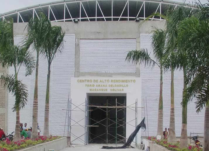 El Coliseo en acabados